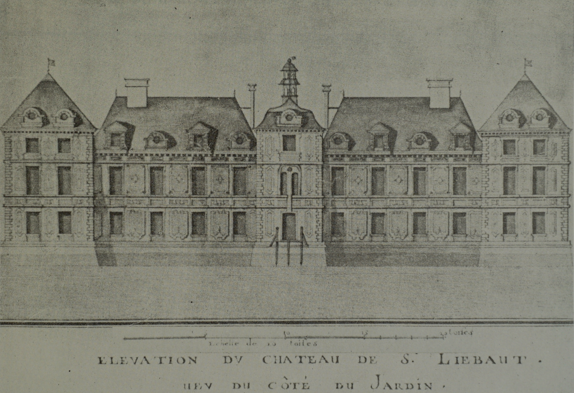 photographie d'un dessin représentant le château de Saint-Liébaud, conservé aux Archives nationales sous la cote NII/Aube/3